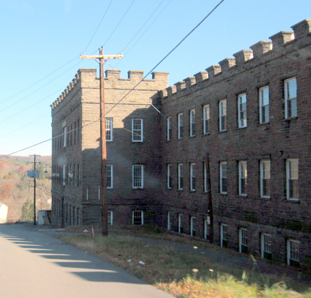 Hawley, Pennsylvania